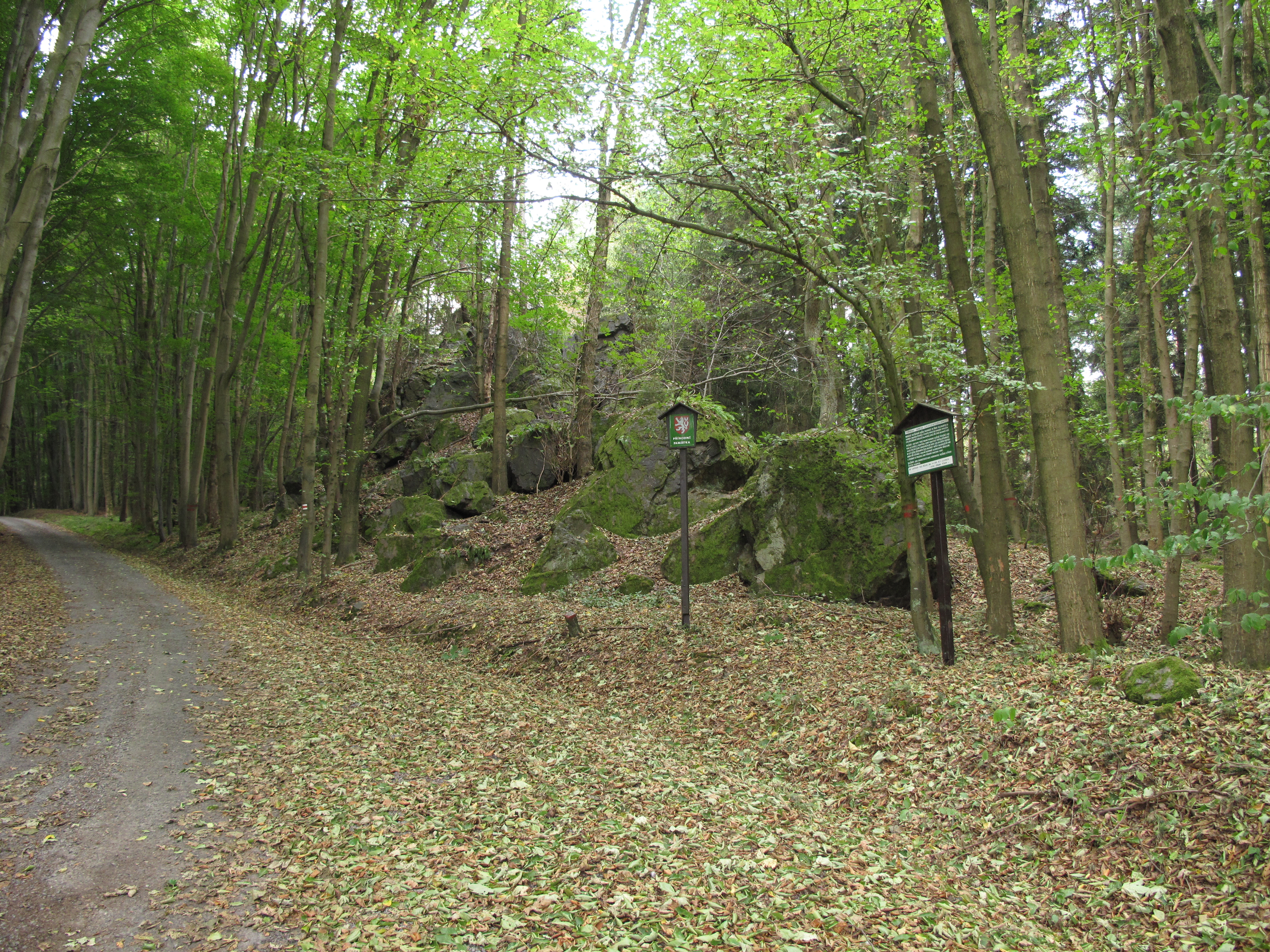 Přírodní památka Loupensko. Okres Klatovy, Česká republika.